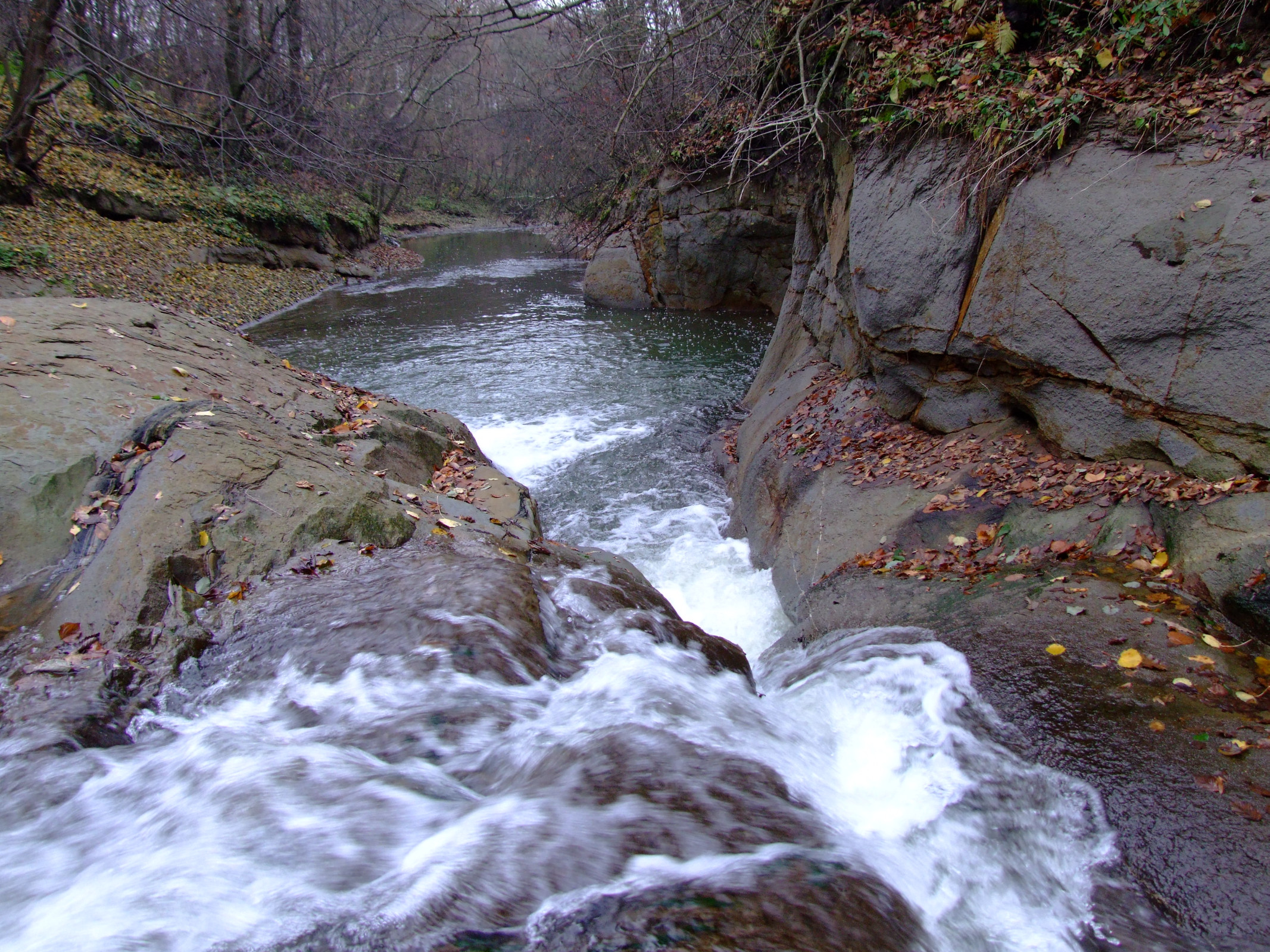 Skałki na rzece w Rdzawie